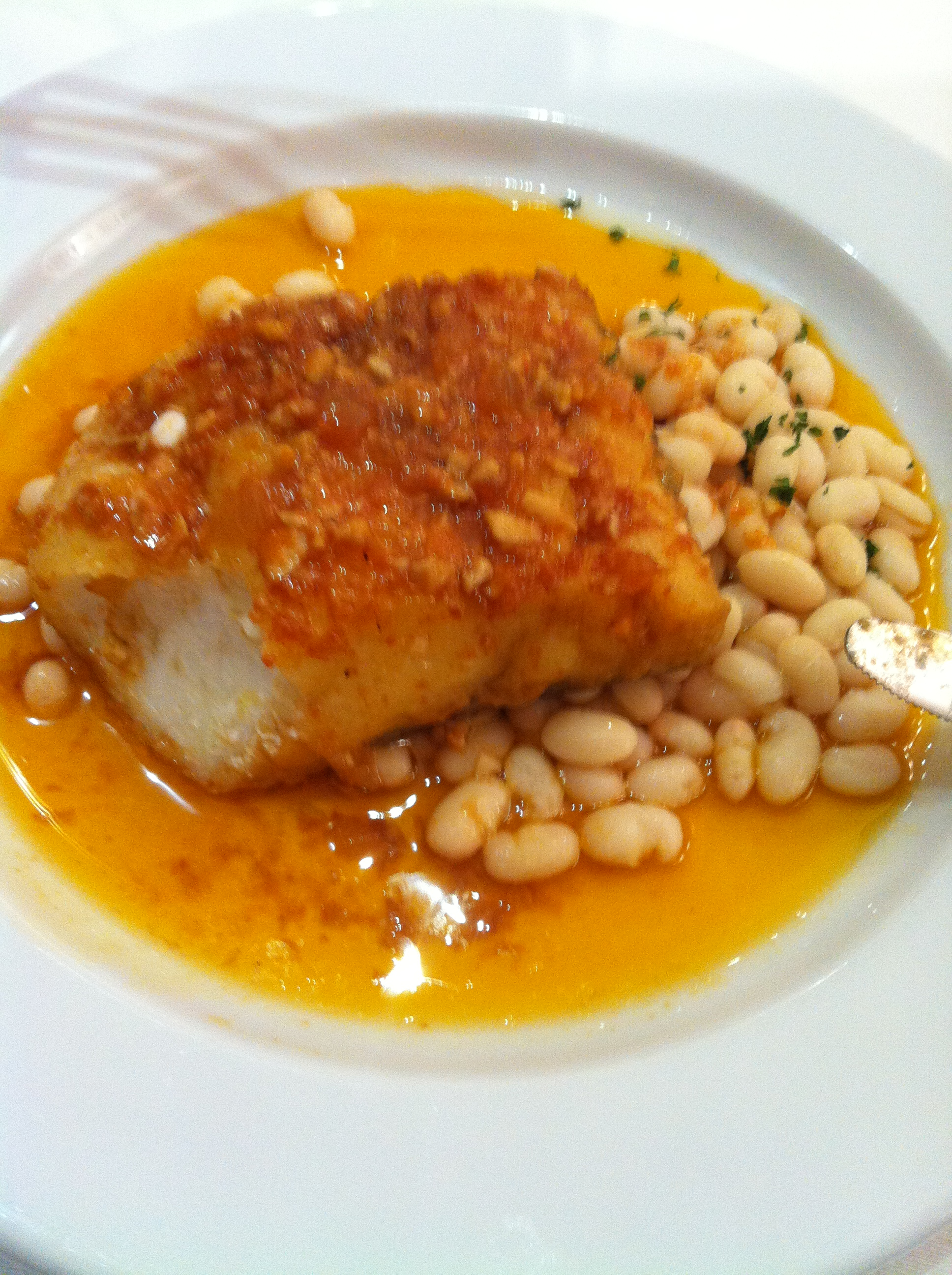 Ca l'Estevet- Bacallà a la llauna